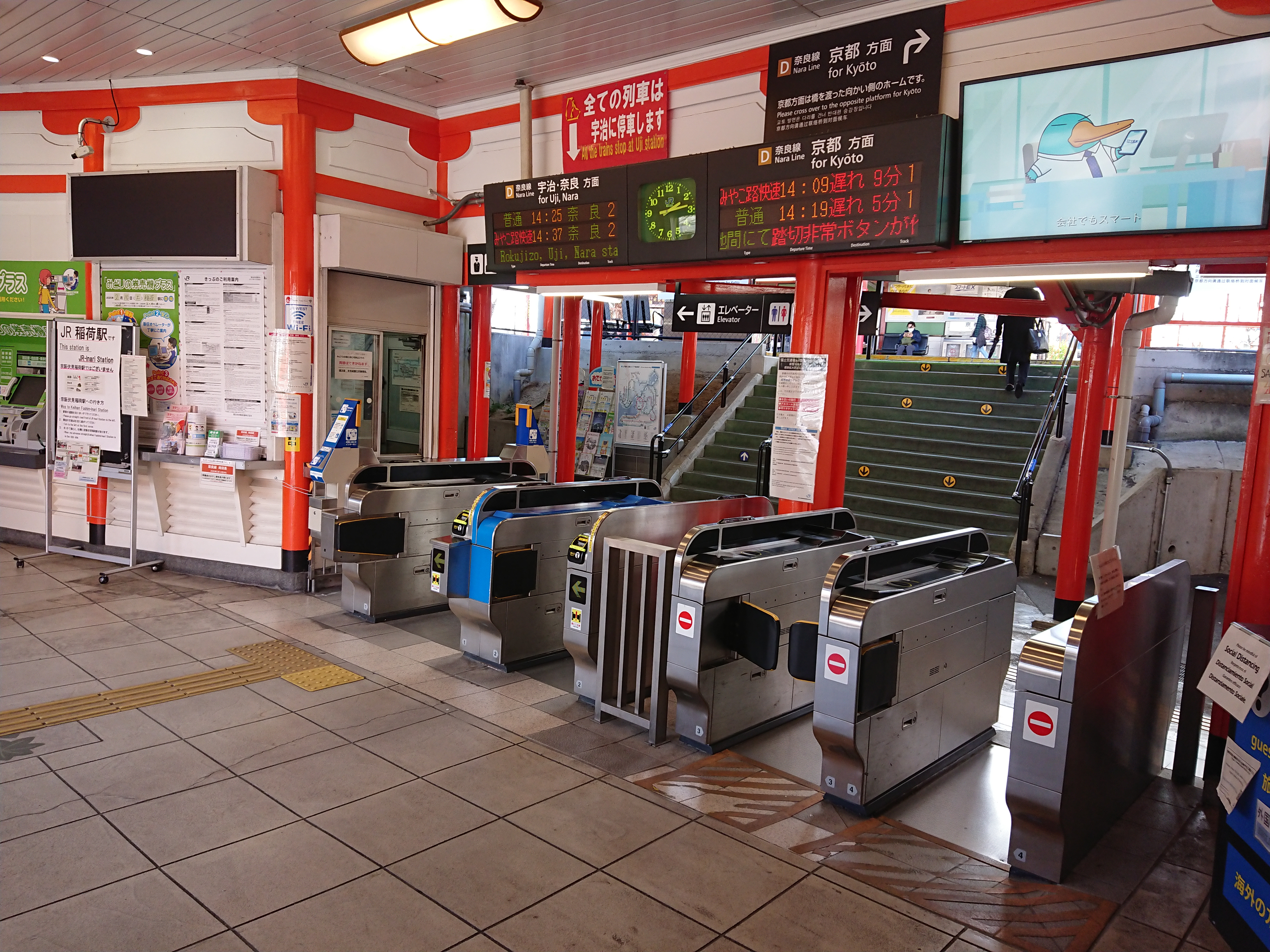 JR奈良線 稲荷駅 改札口（京都市伏見区）